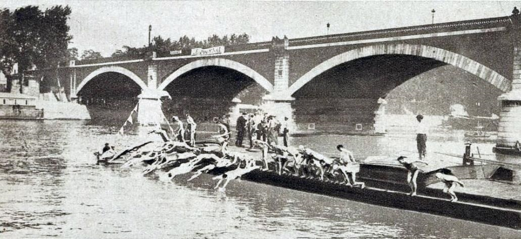 Départ de la traversée de Paris à la nage en 1929, depuis le Pont de Invalides (juillet).